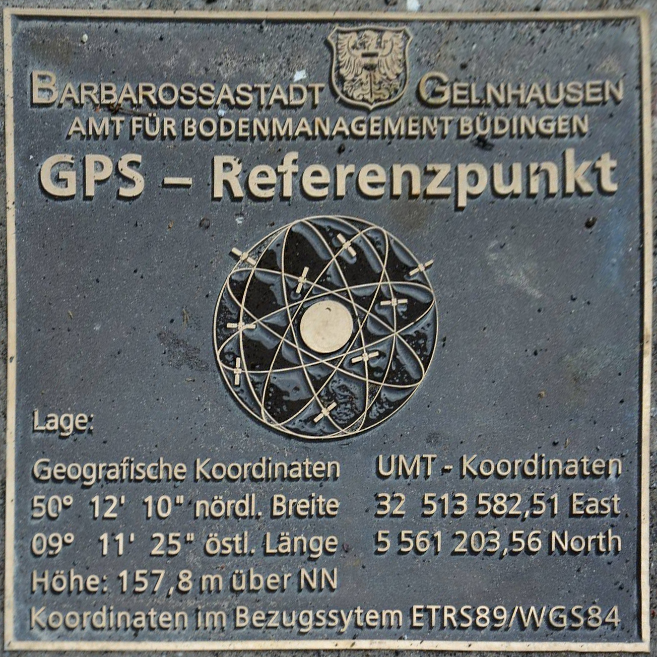 Messingtafel am GPS-Referenzpunkt am Obermarkt in Gelnhausen